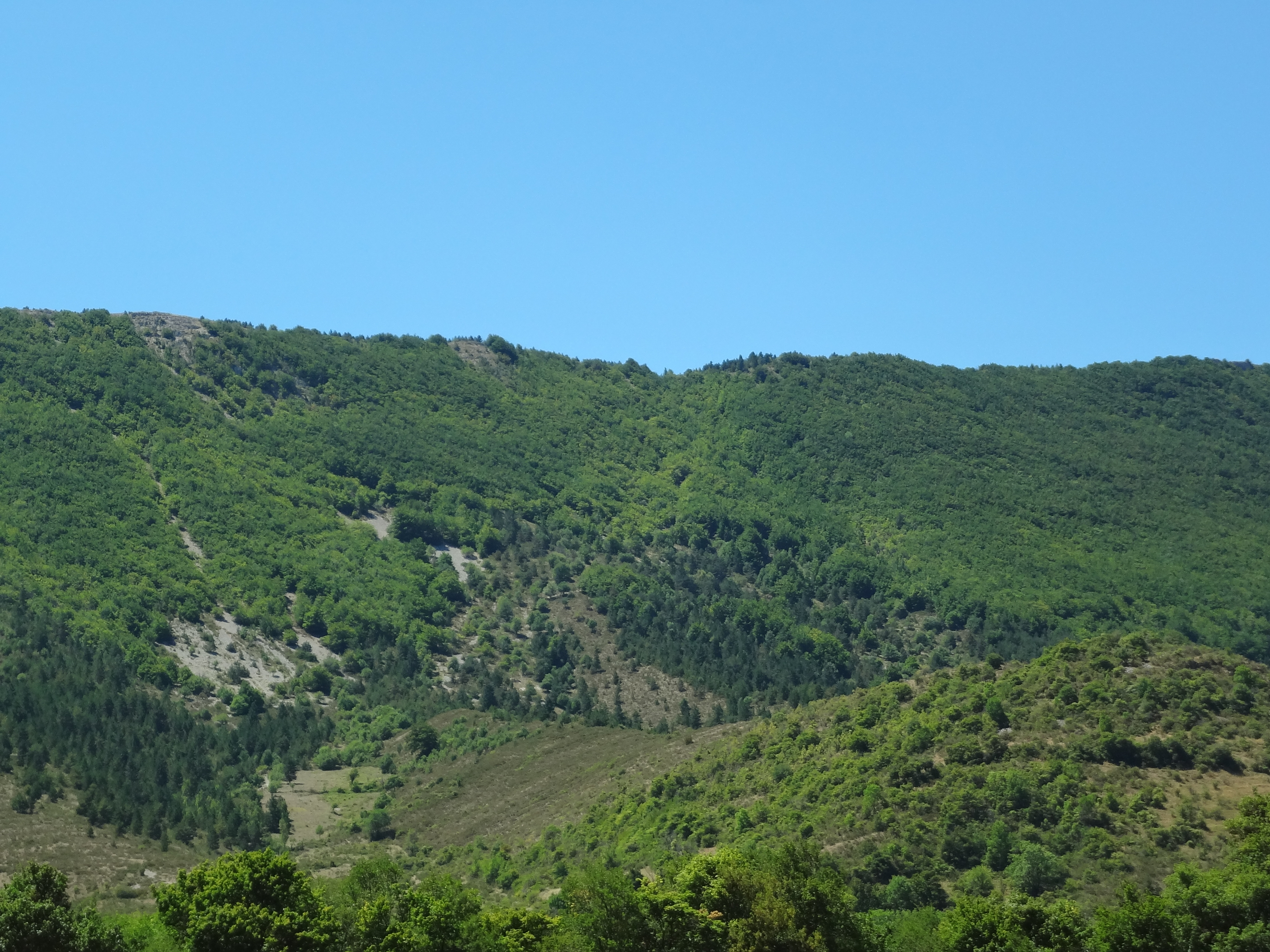 pas de redortiers vu du nord, des Omergues (endenture en V au centre de l'image)